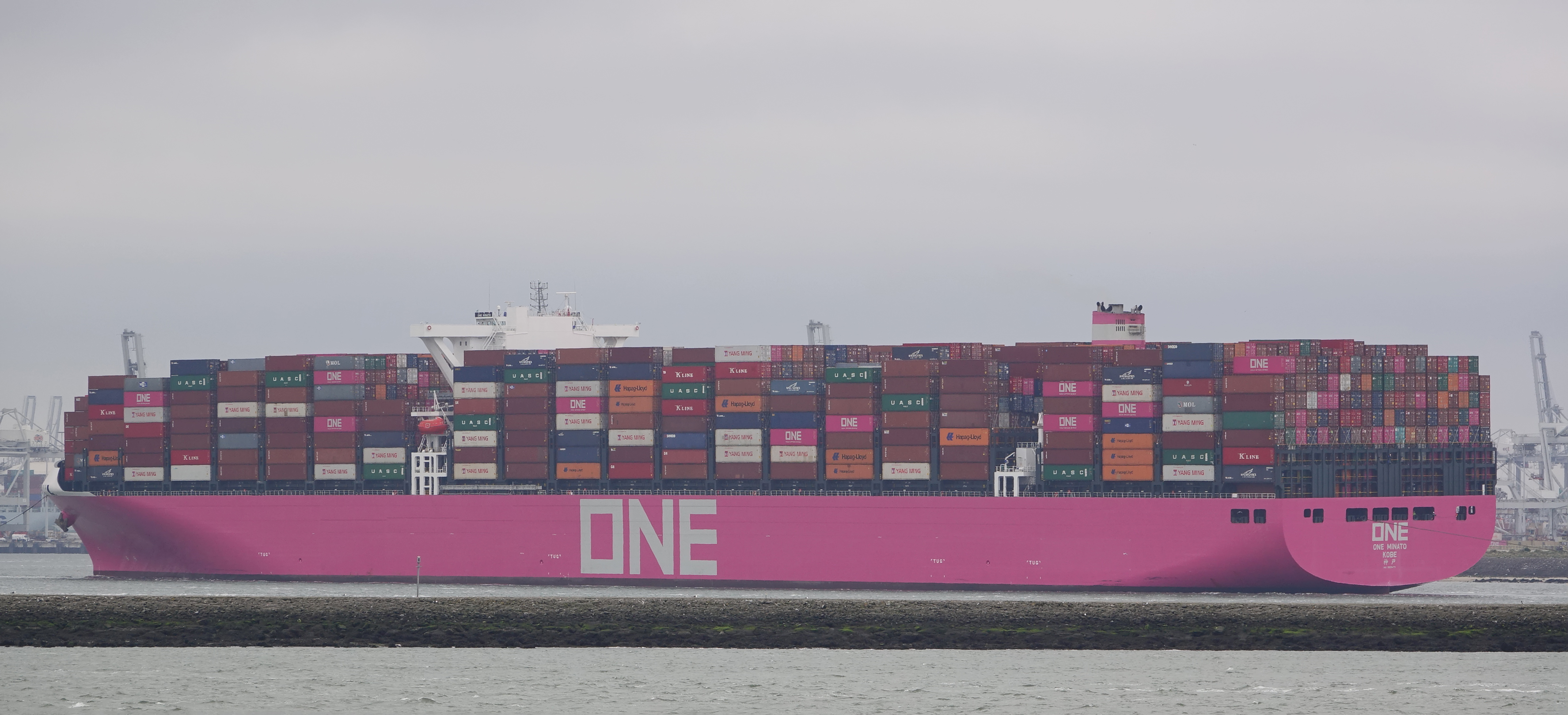 Europoort 21-5-2019